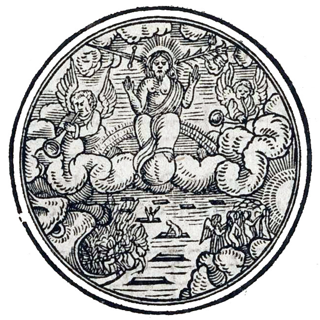 Ein newes Christlichs Lied/ Dadurch Deudschland zur Busse vermanet : Vierstimmig gemacht Durch/ Johan. Walter / Johan. Walter. - [Online-Ausg.]. - Wittemberg : Rhaw Erben, 1561